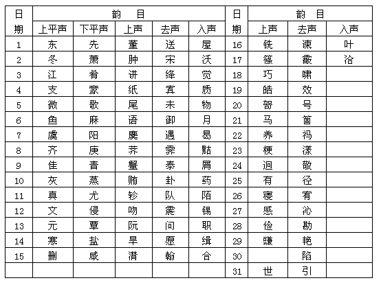 清朝韵目代日表。